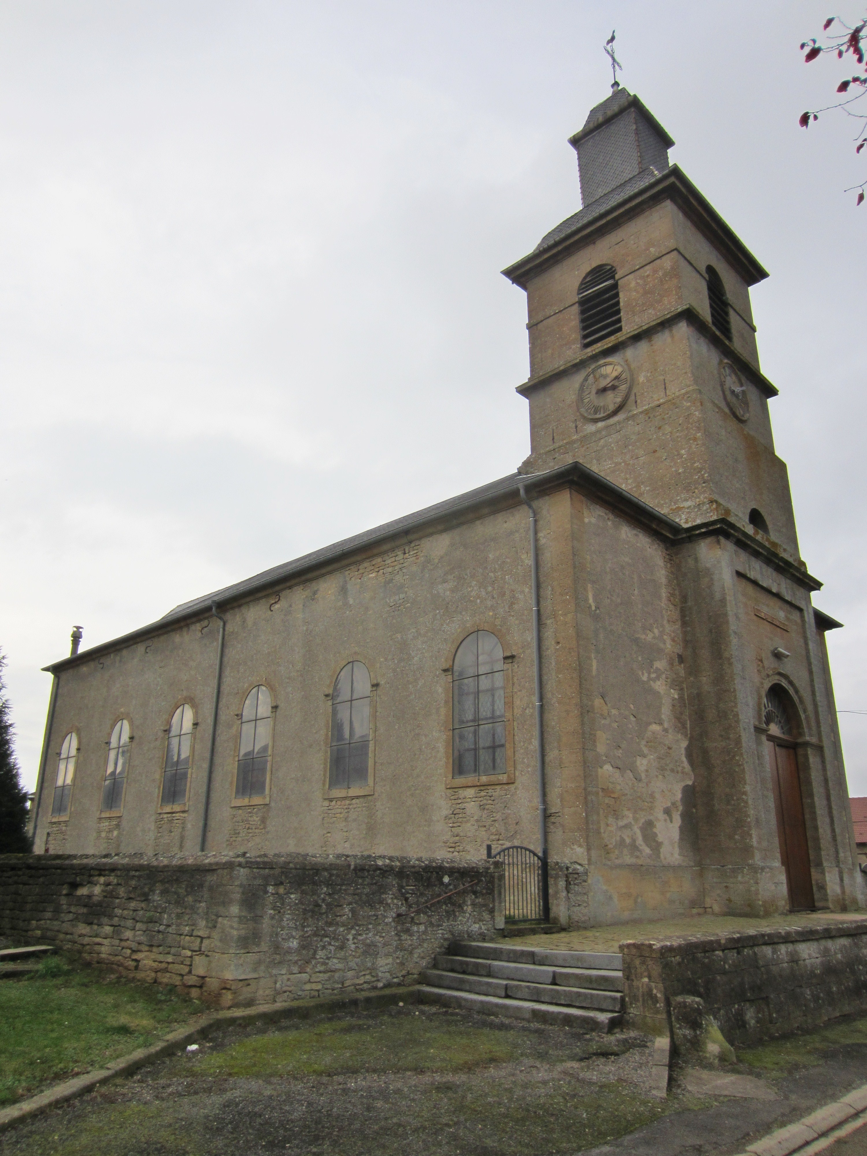 eglise Mercy Haut